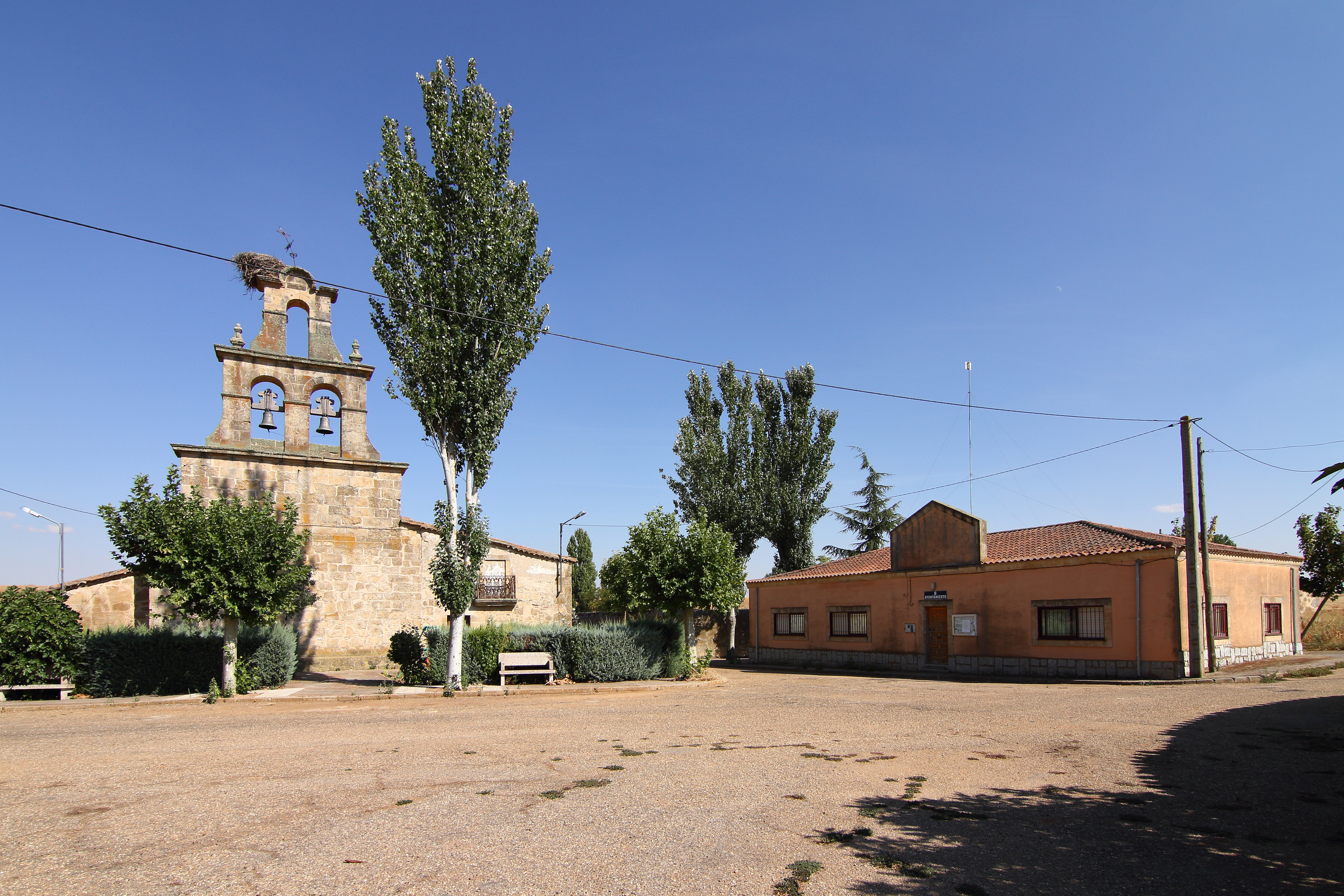 Plaza de Carrascal de Barregas